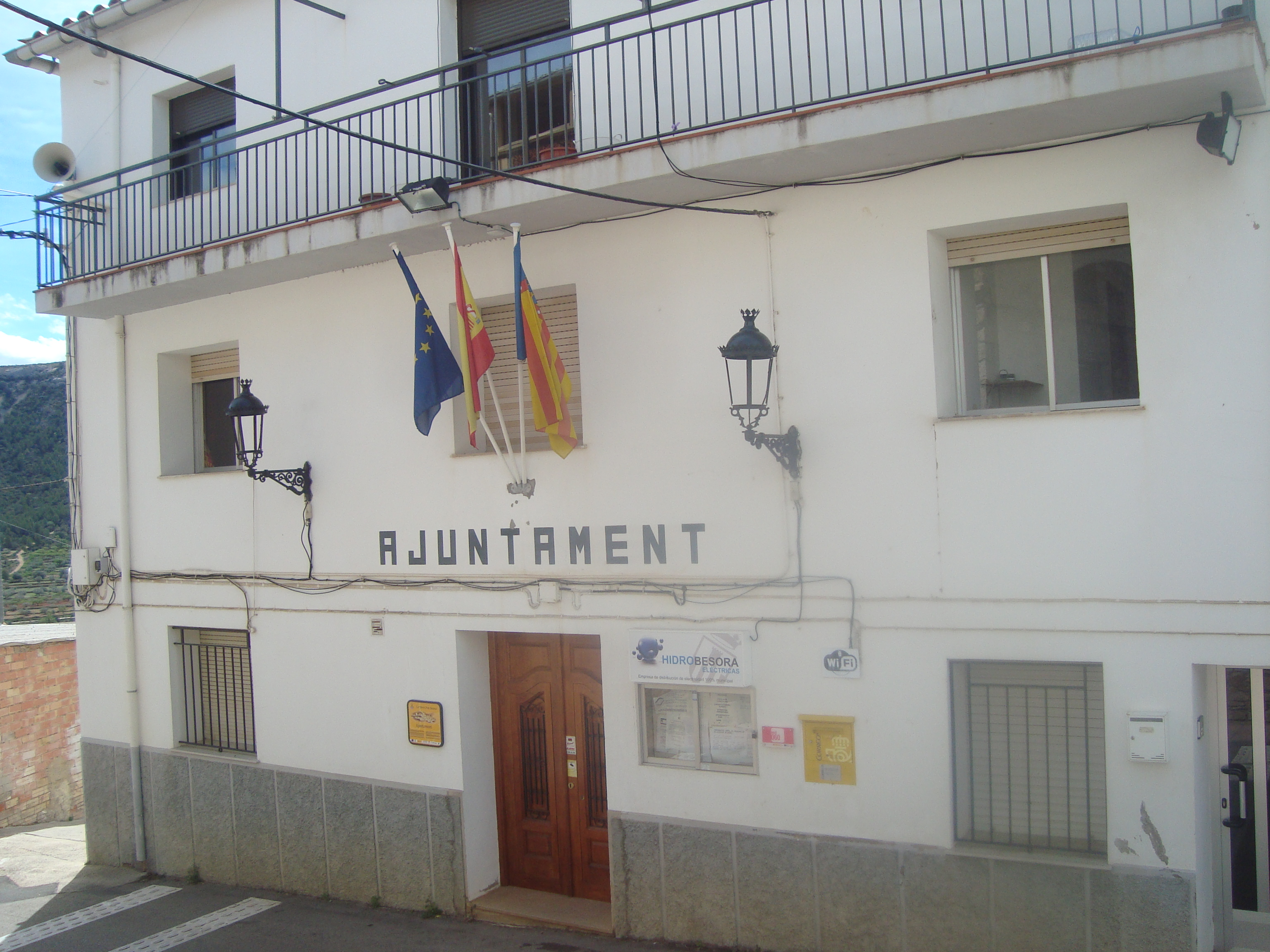 Ayuntamiento de Torre d'en Besora